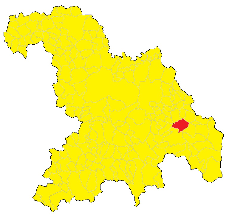 Mappa del comune di Garbagna (AL)